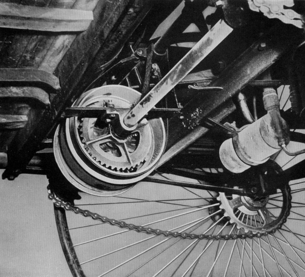 Abb. 20. Ein Blick unter den Wagen zeigt deutlich das Ausgleichsgetriebe und den Antrieb